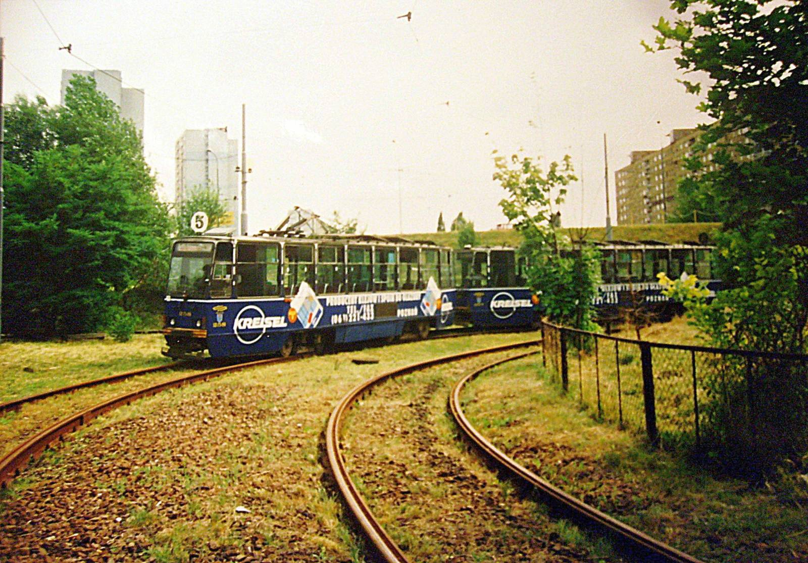 Ratajski Szybki Tramwaj - os. Lecha